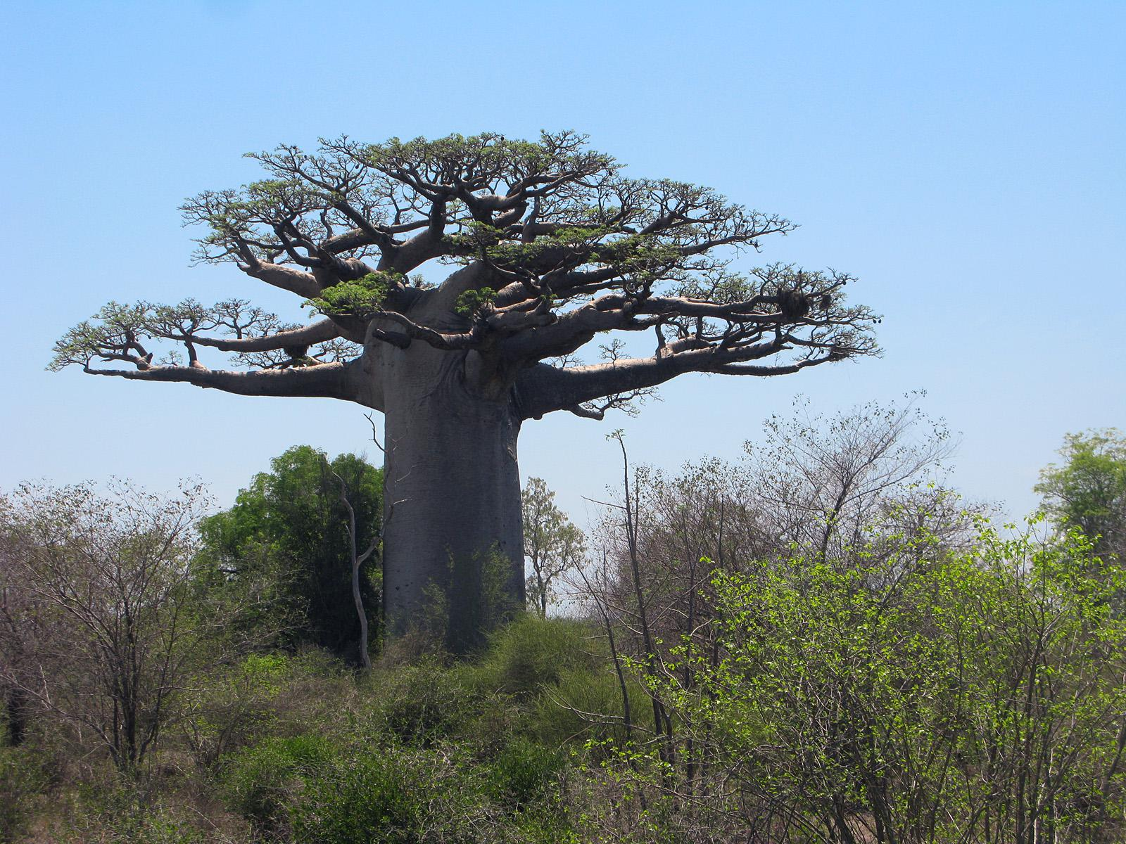 Baobab (Adansonia) du Sud-Ouest de Madagascar